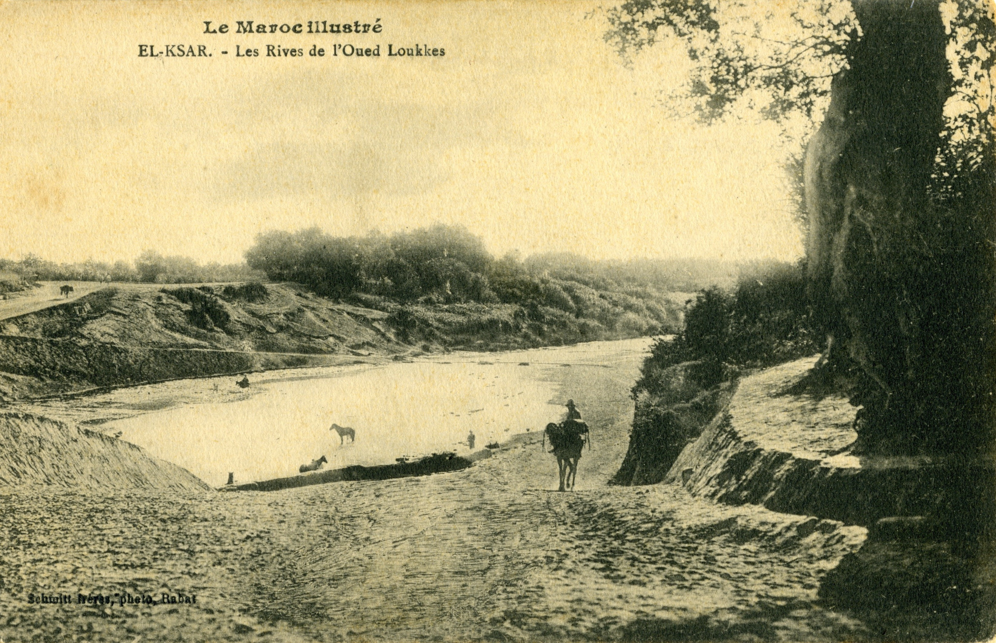 environs du lieu de la bataille d'Alcacer Quibir